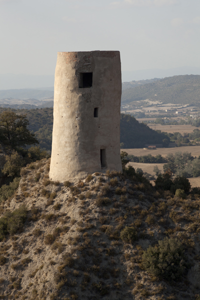 Torre del Ballaster, a Castellfollit de Riubregós